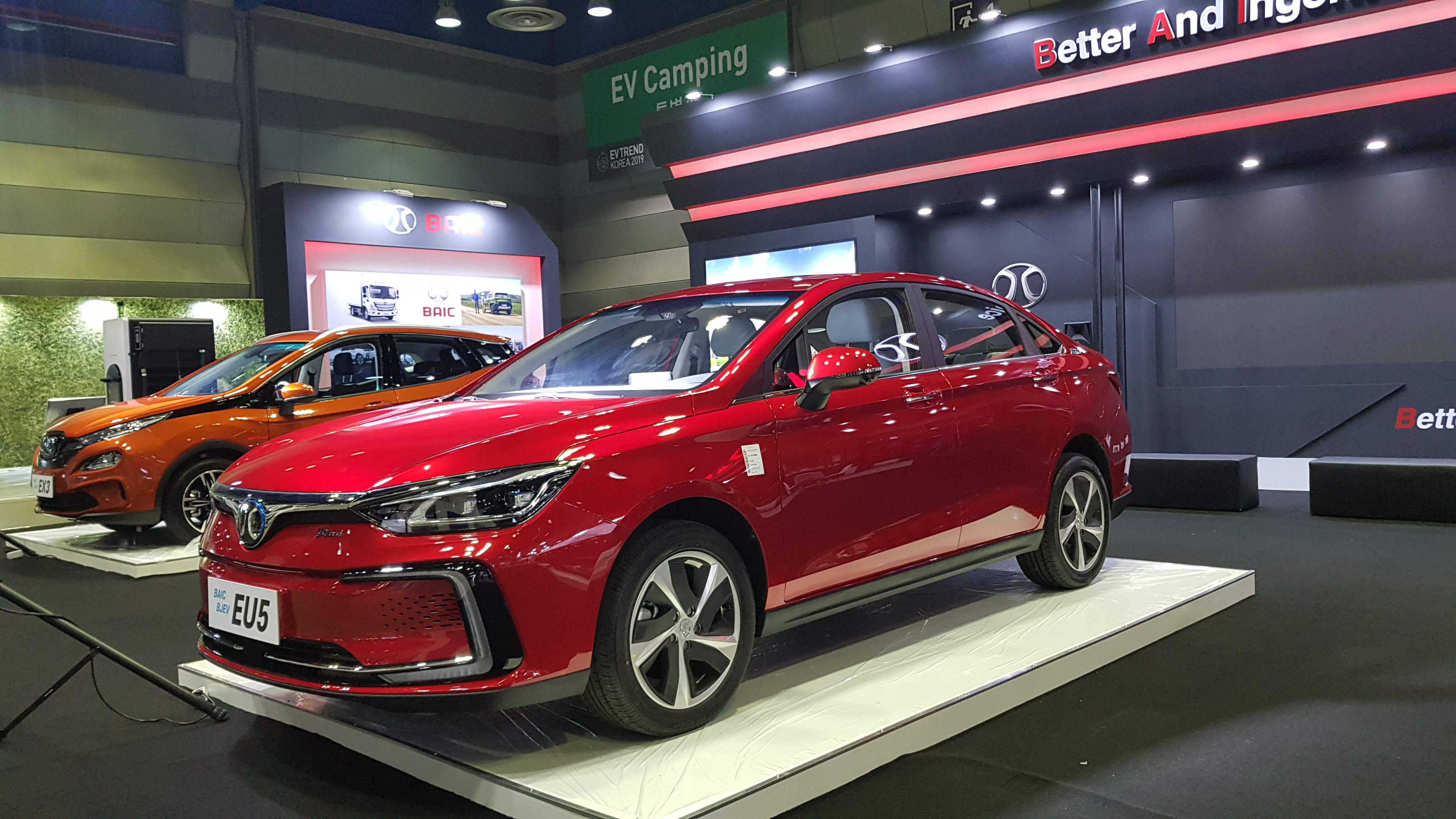 북경모터스 EU5